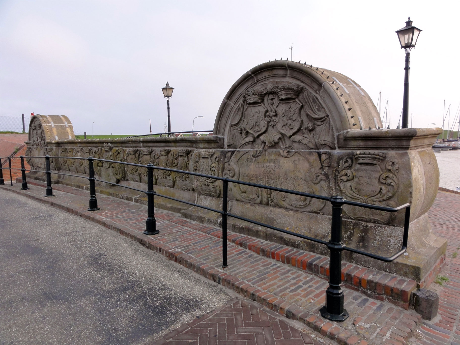 Brug over het Zijldiep in Termunterzijl met ornamenten als gedenktekens uit 1724